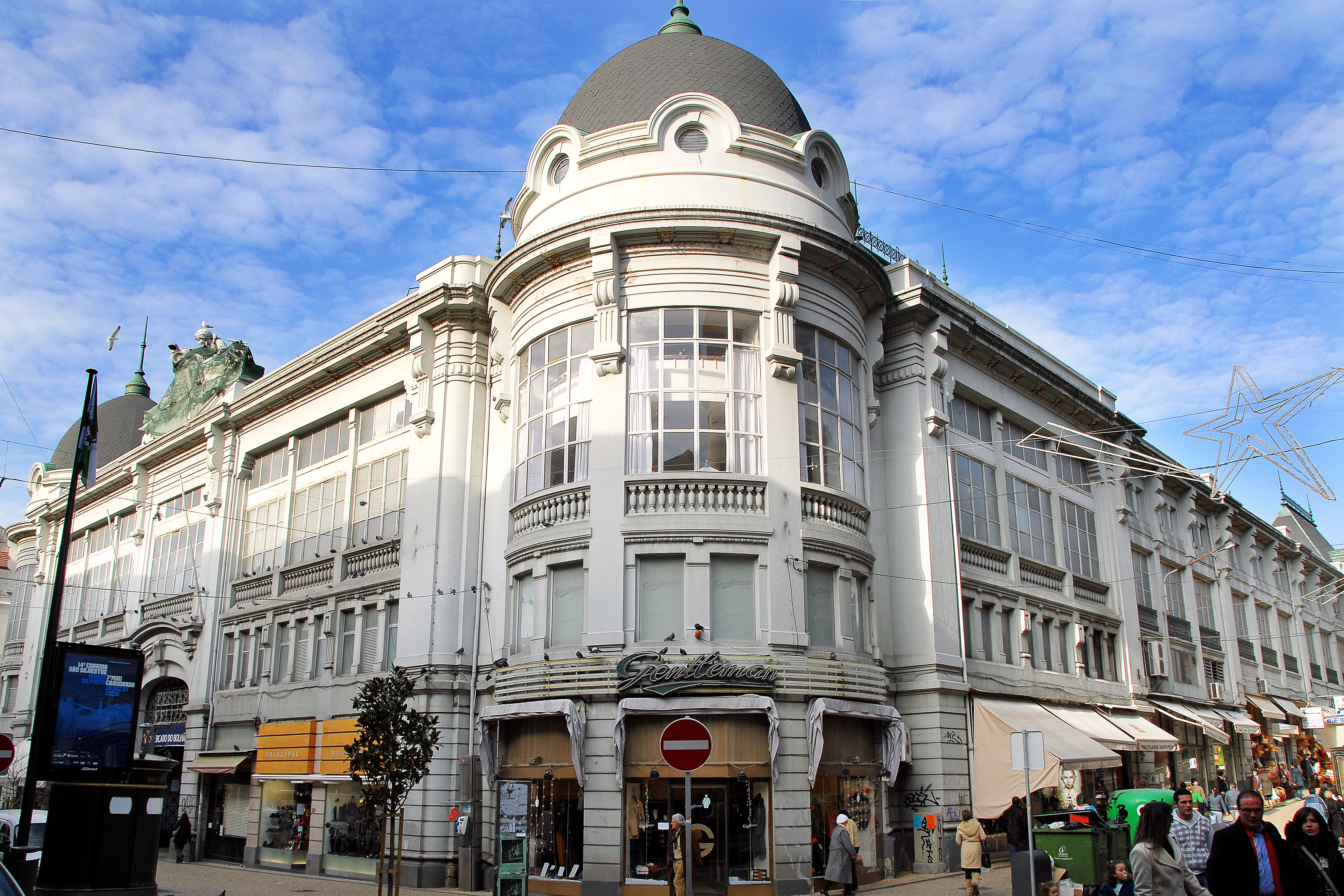 Mercado do Bolhão This file was uploaded for Wiki Loves Monuments in Portugal with the unique identifier 155837.